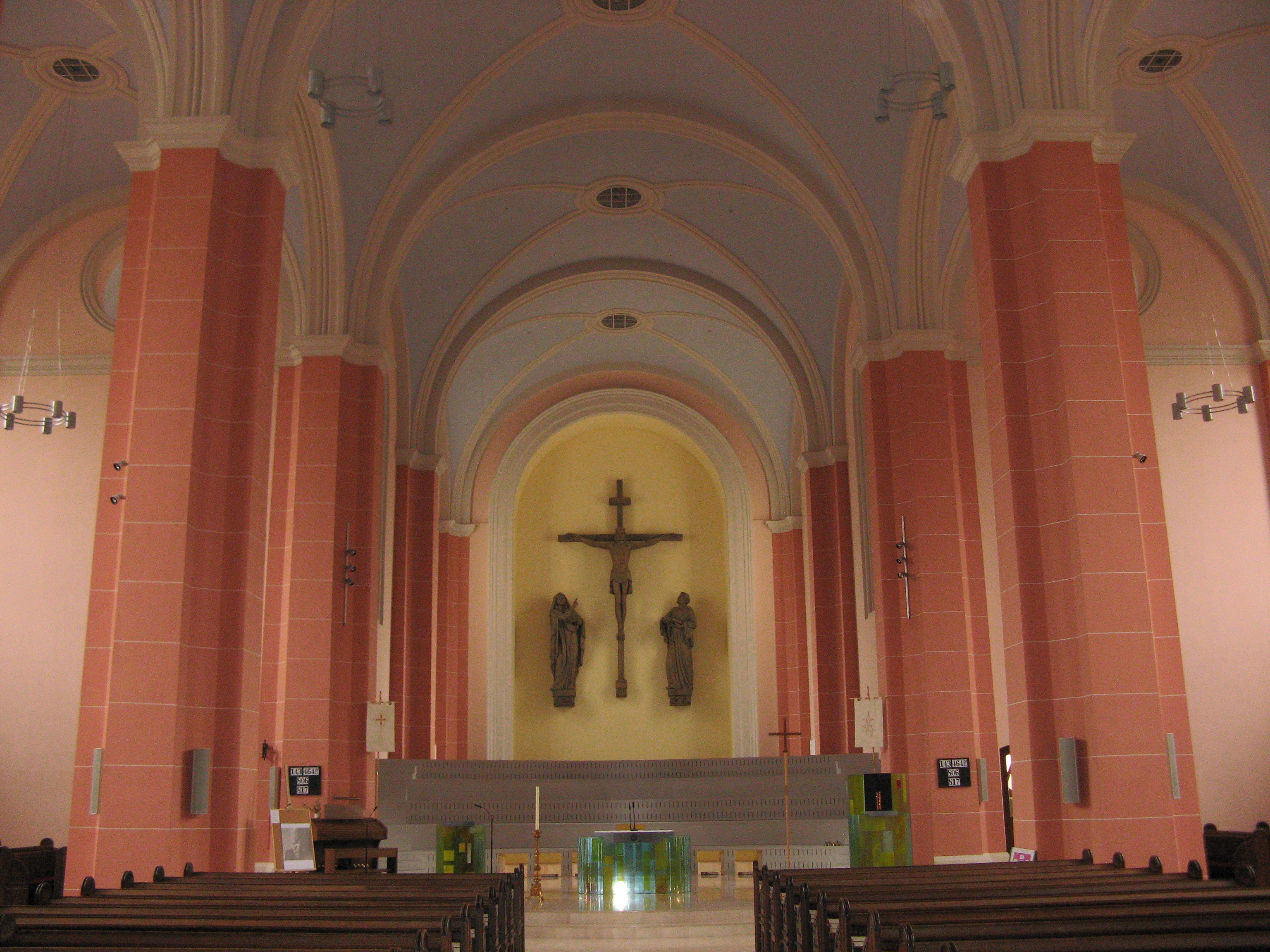 Innenraum der Meidlinger Pfarrkirche (1842-45) von Karl Rösner in Wien-Meidling, Kreuzigungsgruppe Holzskulptur von Erich Pieler